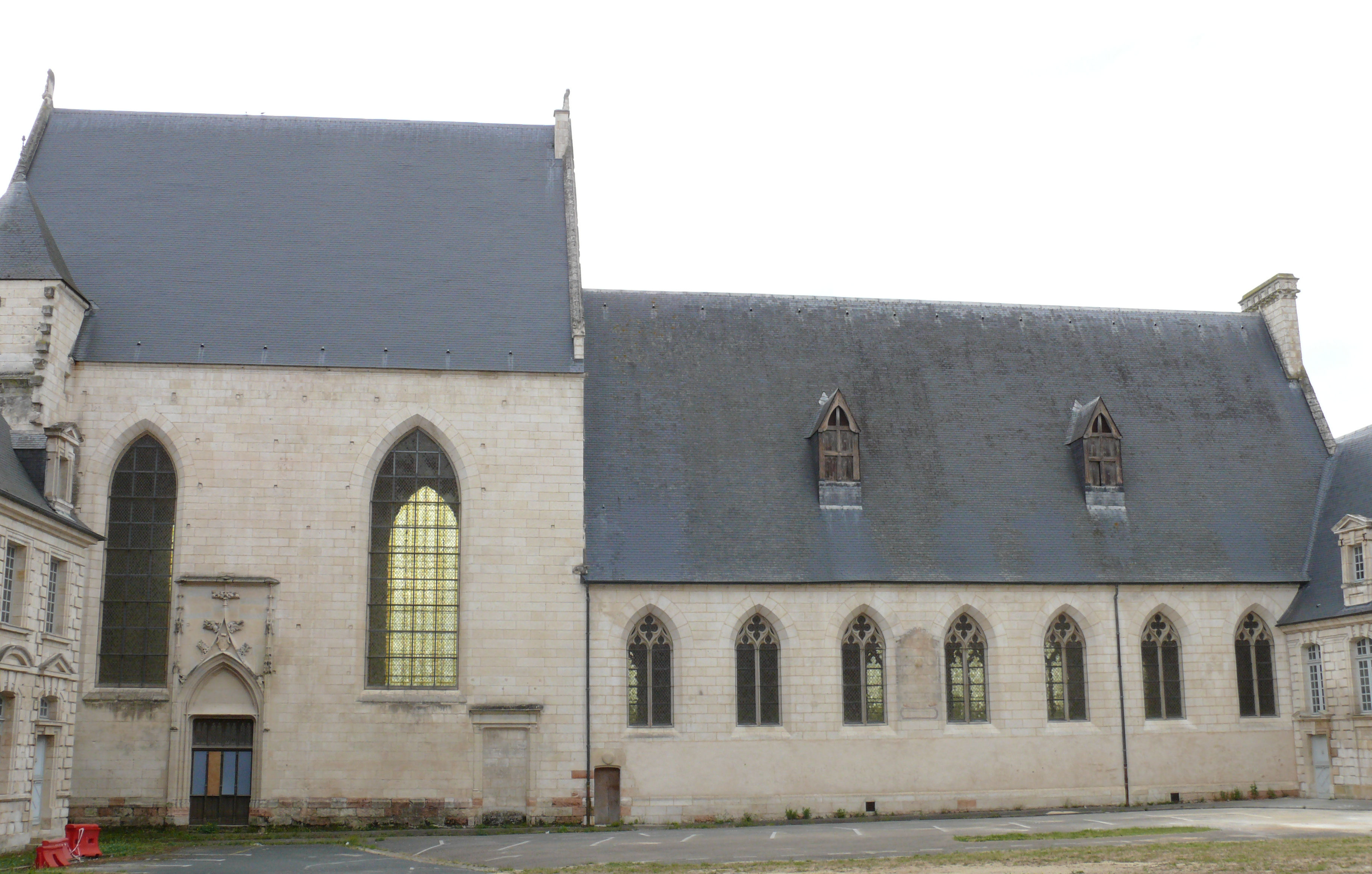 Bourges - Hôtel-Dieu - Chapelle et chambre des malades côté cour